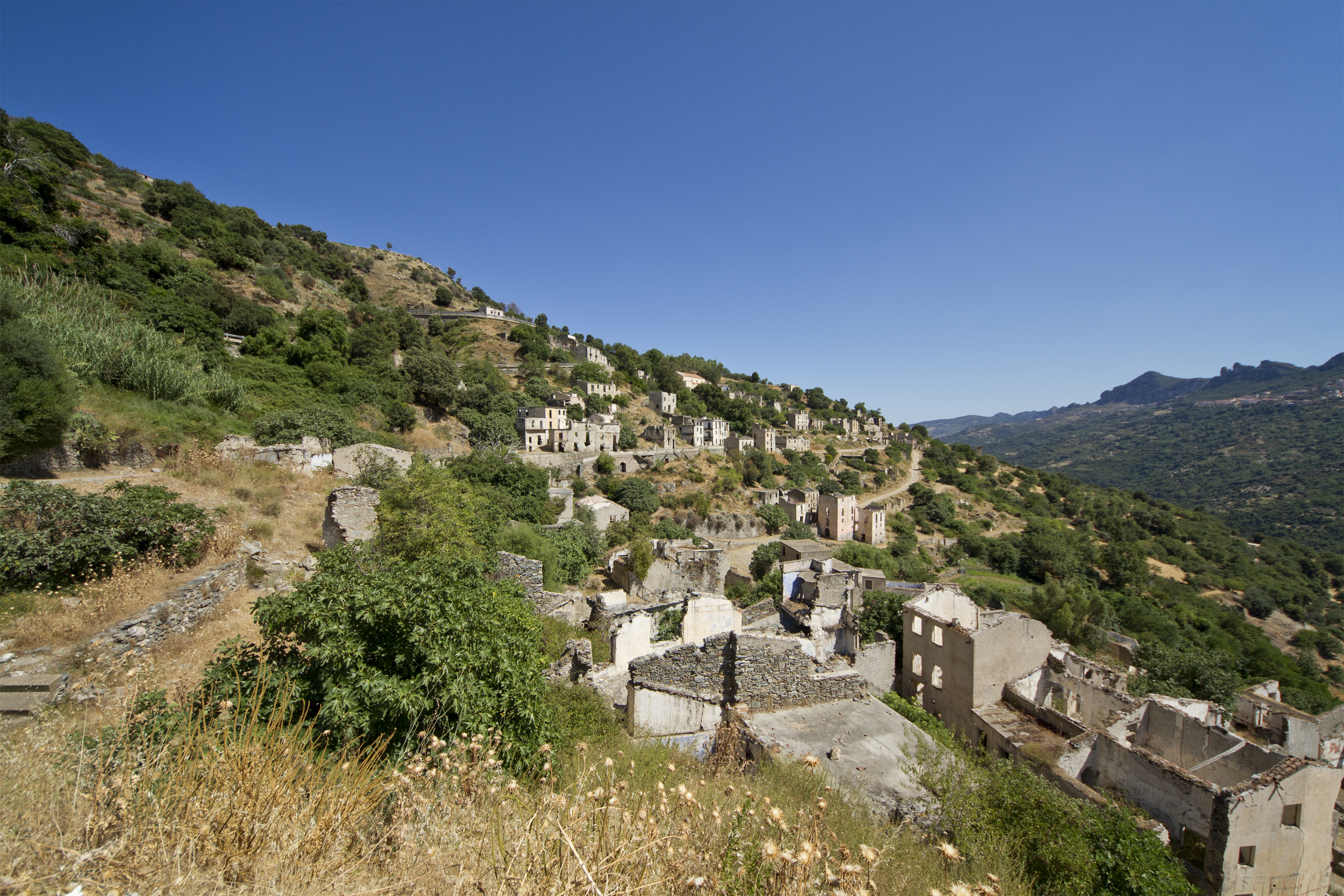 Gairo Vecchio, Ogliastra, Sardinia, Italy